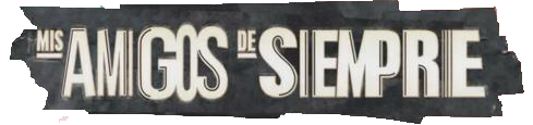 Logo de "Mis amigos de siempre" de El trece